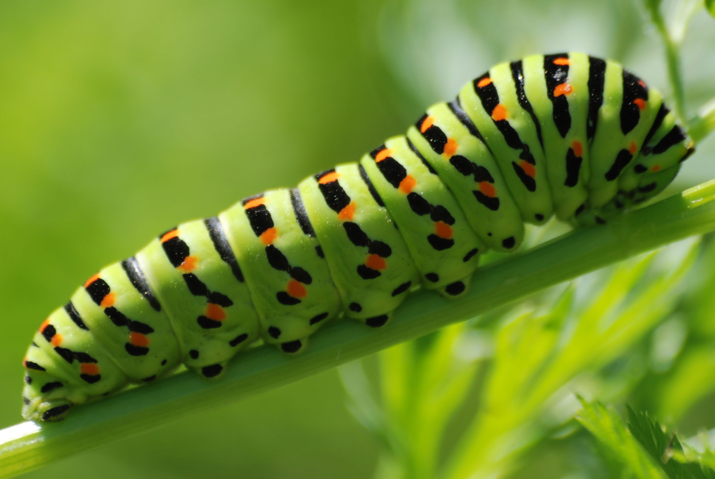 Papilio machaon (Larve)